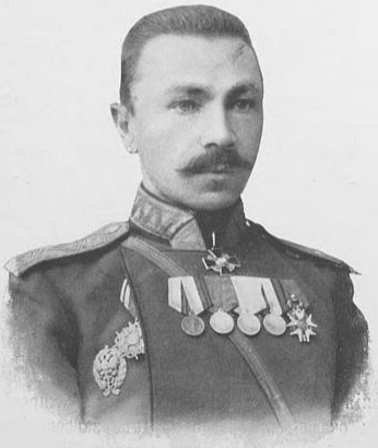 Кондратович, Киприан Антонович